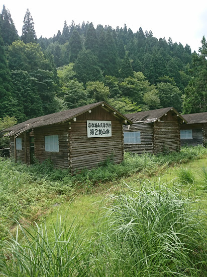 全寮制の高校であった京都美山高等学校の学生寮。今は通信制となっており使われていない。